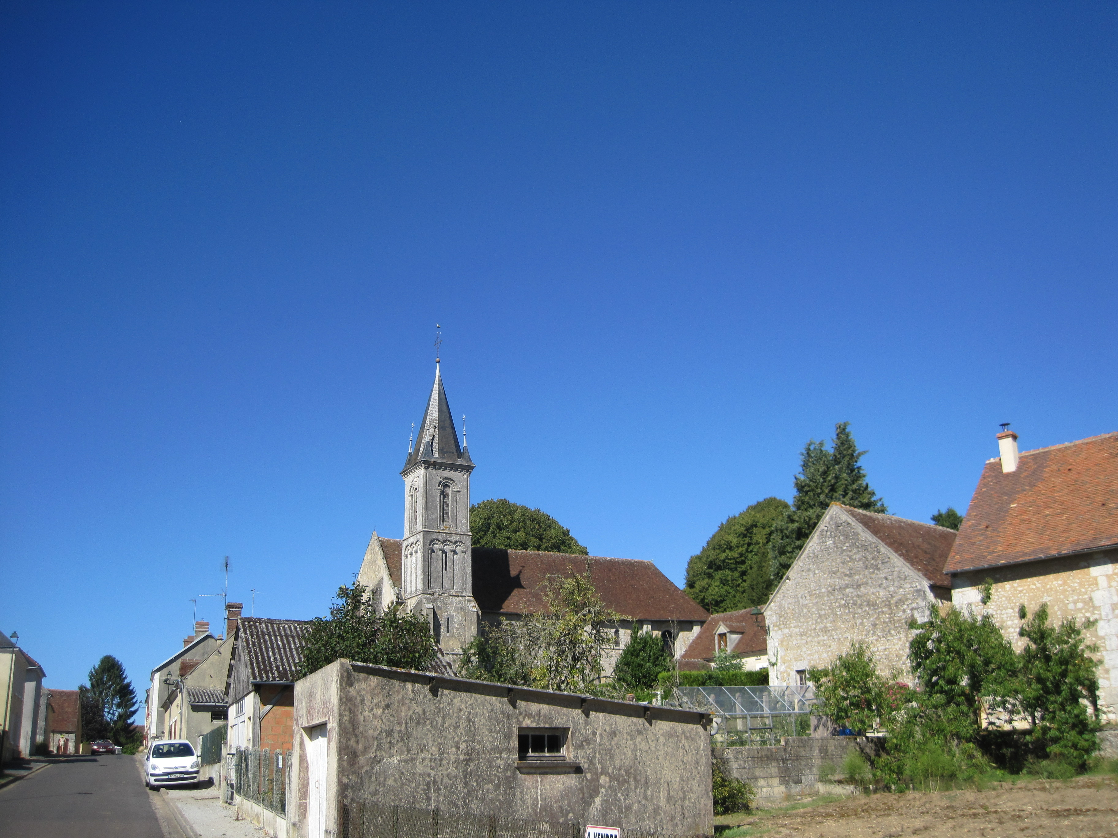 Courcerault et son église, dans l'Orne.